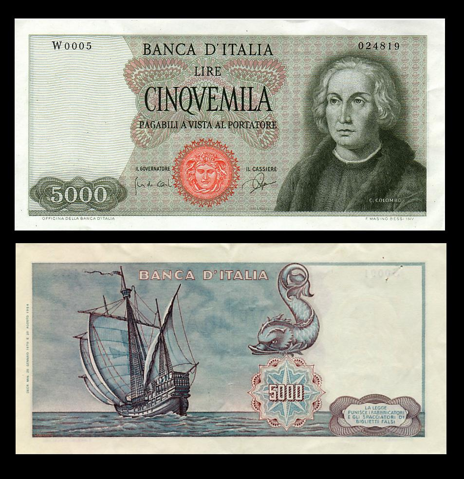 £ 5.000 (Cristoforo Colombo, 1° tipo)